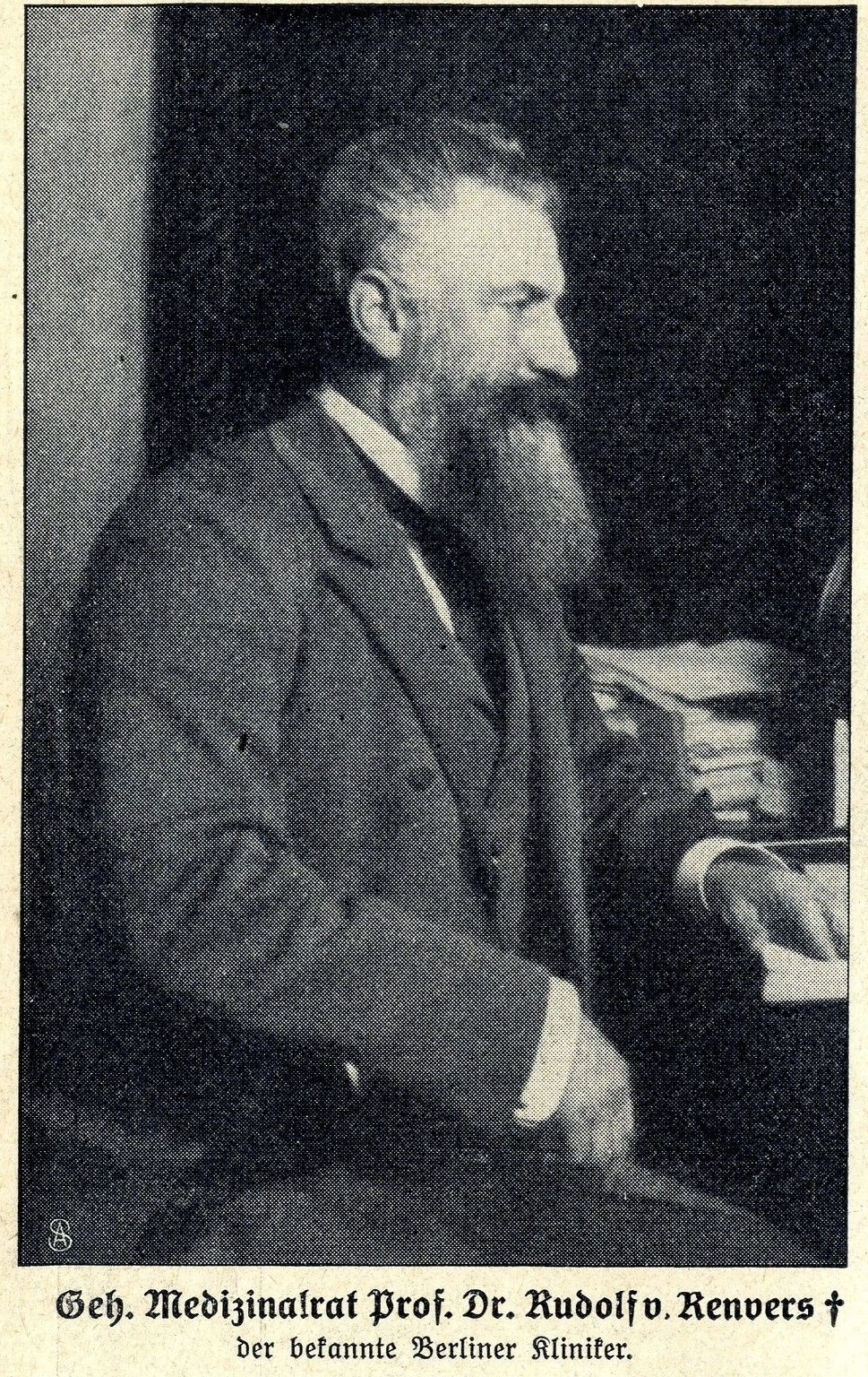 Geheimer Medizinalrat Prof. Dr. Rudolf von Renvers